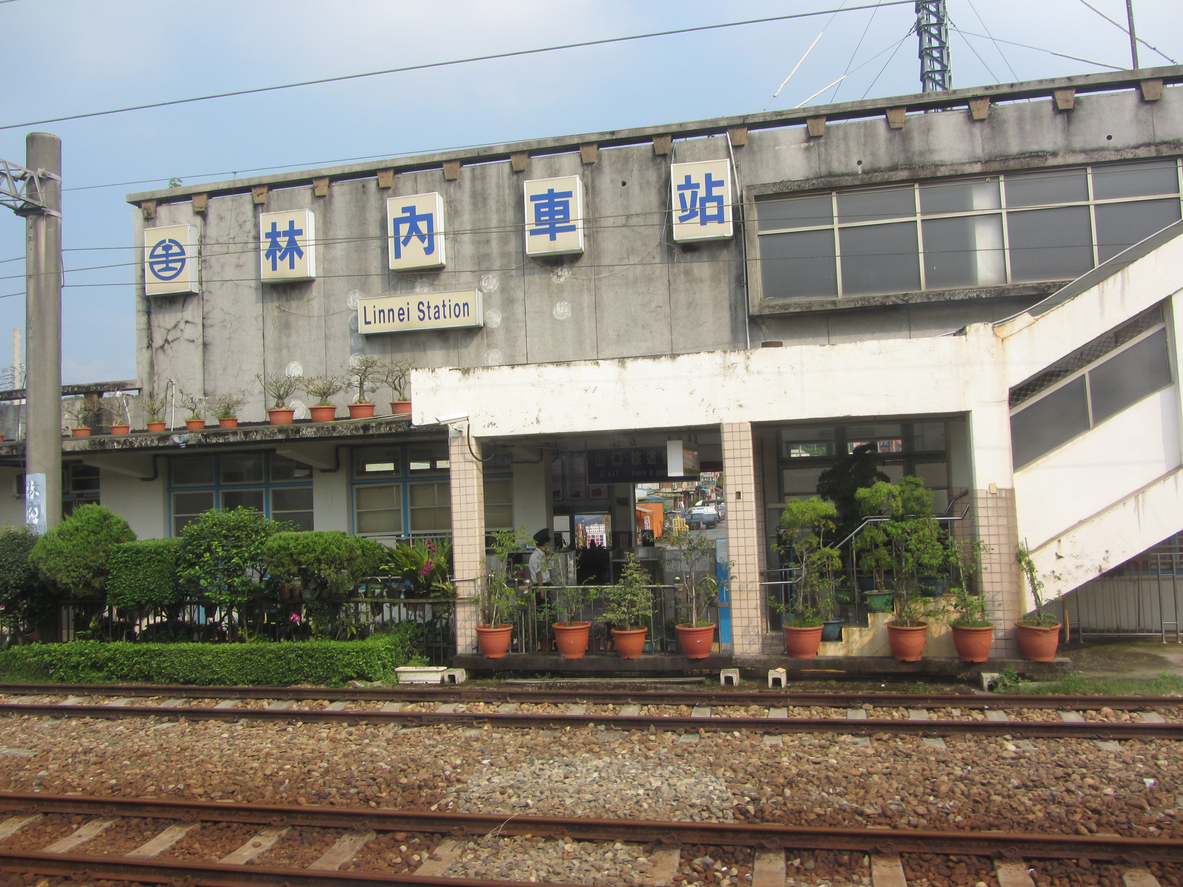 自林內車站月台望向站房